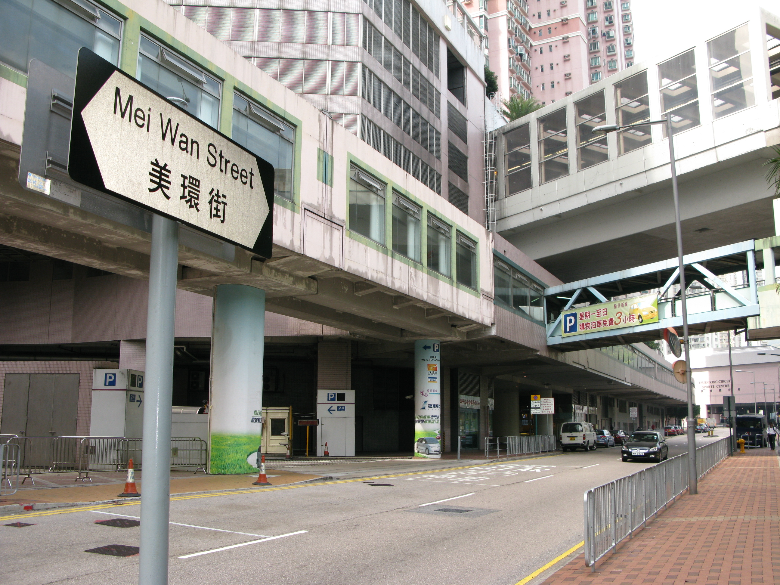 中文（香港）: 香港荃灣美環街